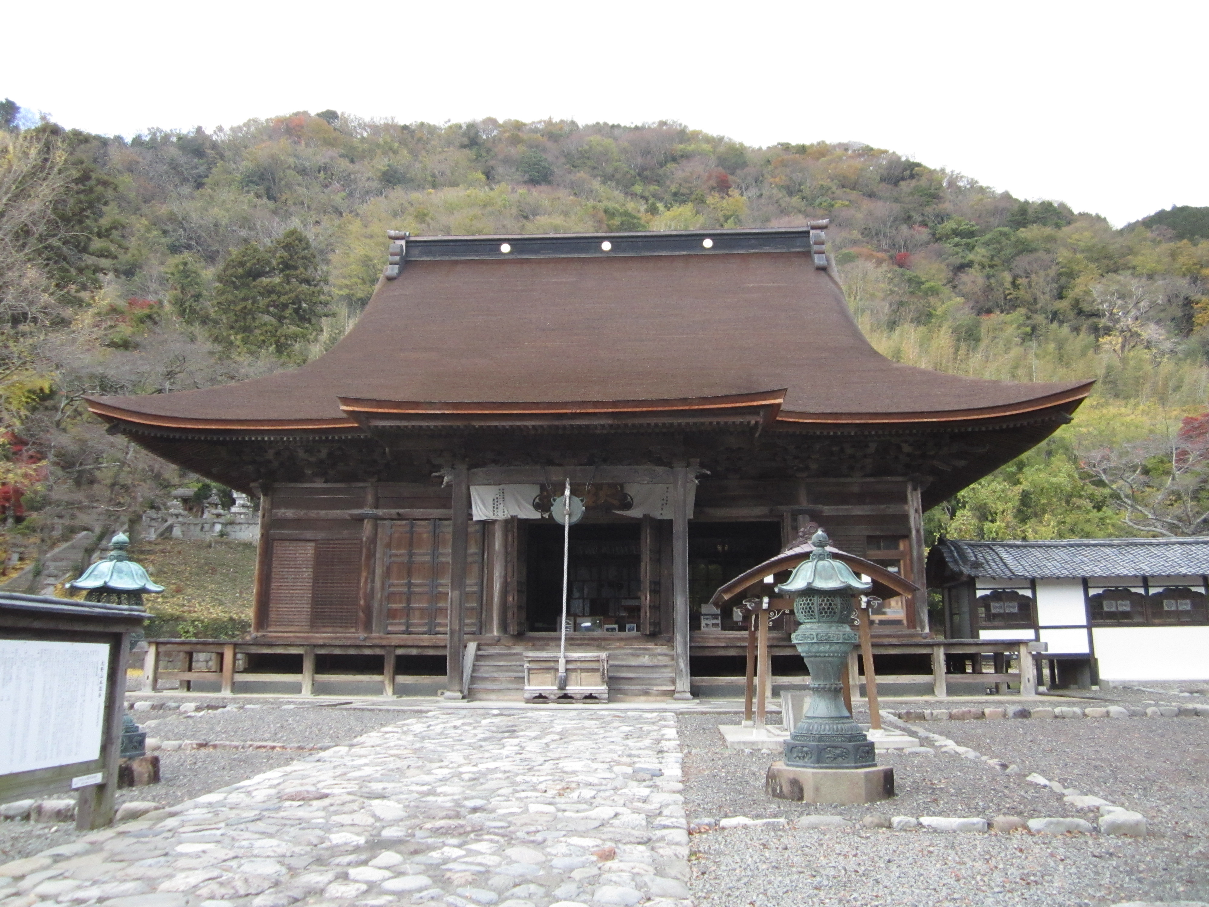 大野山本遠寺本堂